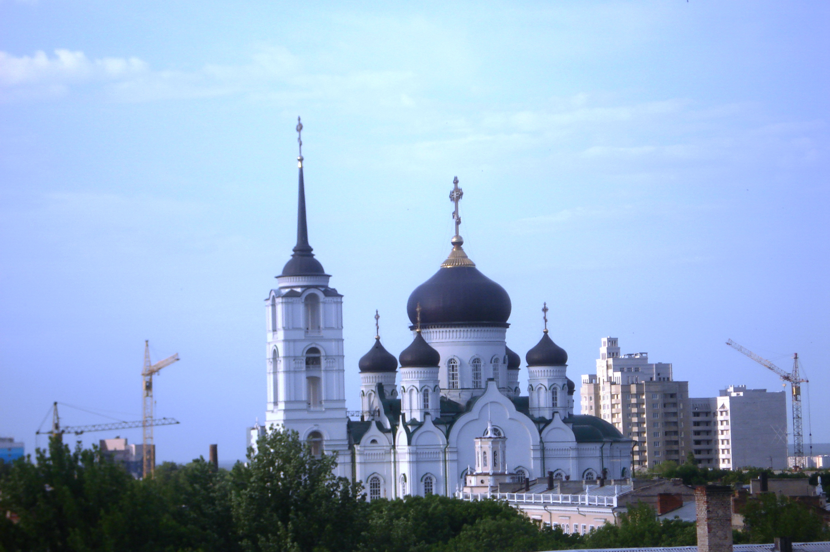 Благовещенский кафедральный собор в Воронеже (вид со стадиона "Труд")